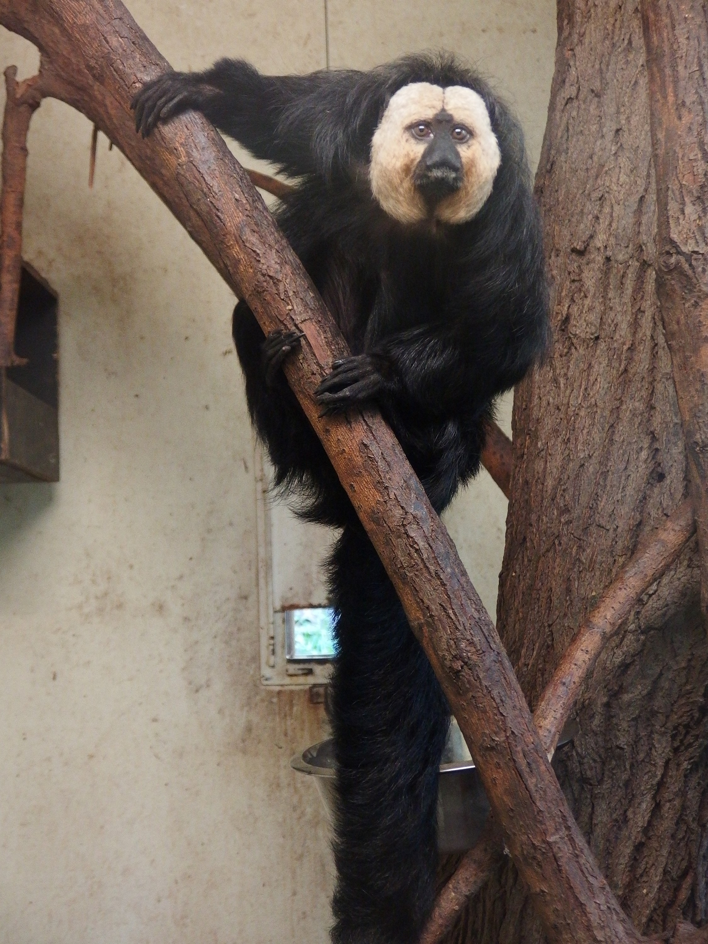 Chvostan bělolící v ZOO Plzeň